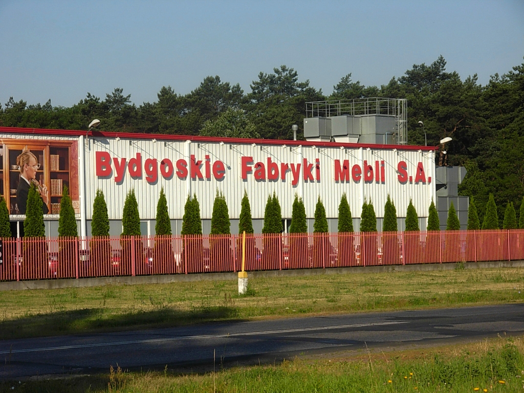 Bydgoskie Fabryki Mebli przy ul. Nowotoruńskiej w Bydgoszczy